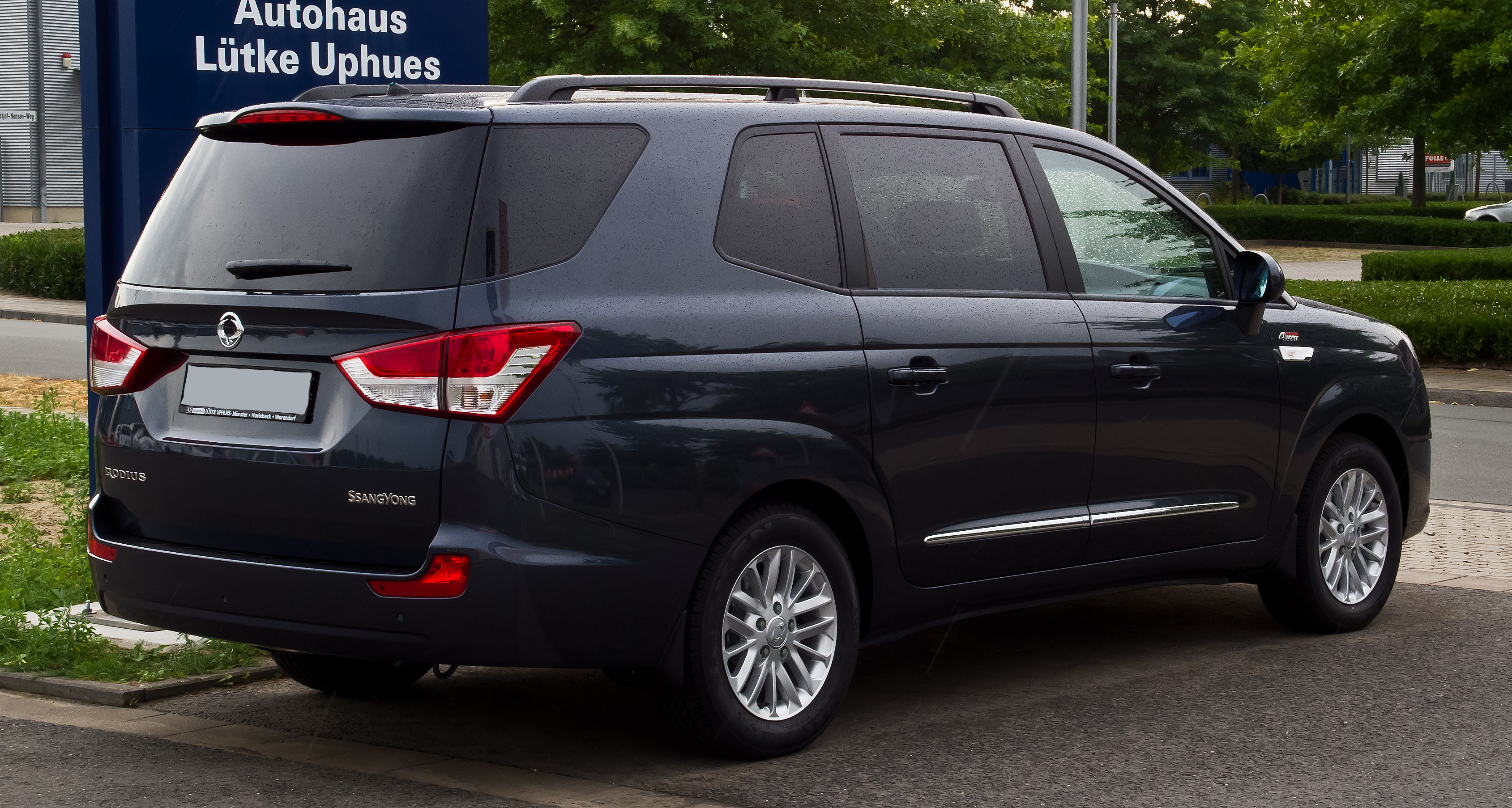 SsangYong Rodius e-XDi 200 4WD Sapphire (II)